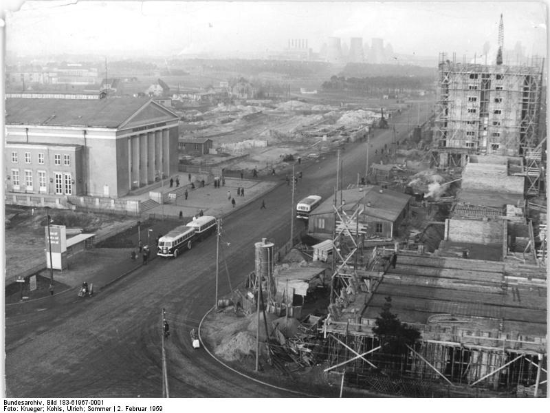 Eisenhüttenstadt, Friedrich-Wolf-Theater, Rohbau Zentralbild Krueger Kohls-Sommer Ho.2.2.1959 1500 Wohnungen für Eisenhüttenstadt. Im Jahre 1959 werden in Eisenhüttenstadt, der ersten sozialistischen Stadt der DDR, 750 Wohnungen schlüsselfertig übergeben und weitere 750 Wohnungen im Rohbau fertiggestellt werden. Wie im Volkswirtschaftsplan vorgesehen, werden vorrangig Wohnungen mit einer Grundfläche von durschschnittlich 55 qm gebaut. Außerdem sind zahlreiche Sonderbauten in Angriff genommen, u.a. ein Textilkaufhaus, ein Möbelkaufhaus, zahlreiche Läden und eine Grundschule. UBz: Übersicht aus dem Baukomplex IV, der sich rund um das Friedrich-Wolf Theater erstreckt. Blick auf eines der Punkthäuser, daß Mitte Februar 1959 im Rohbau fertiggestellt sein wird.